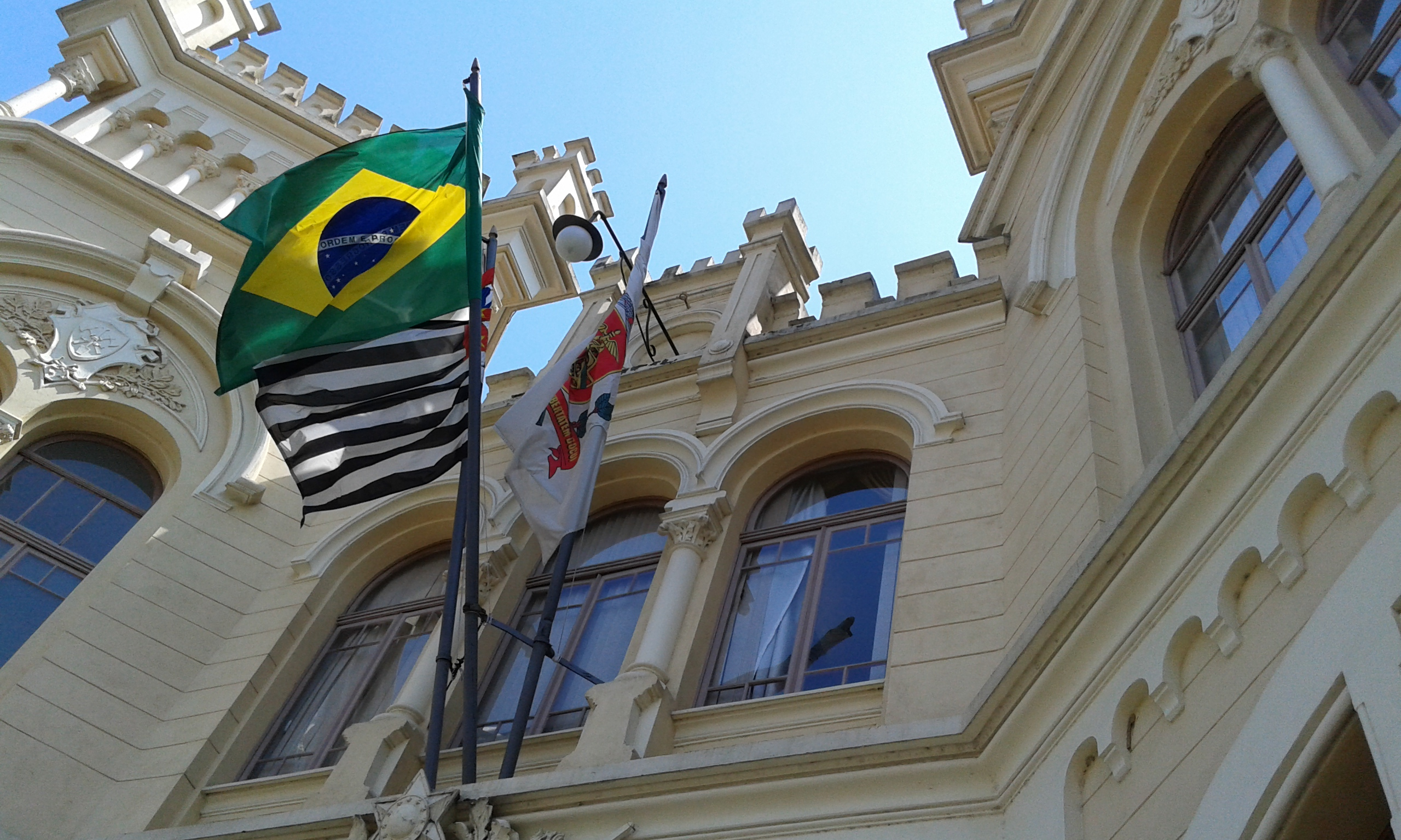 Castelinho - Hoje